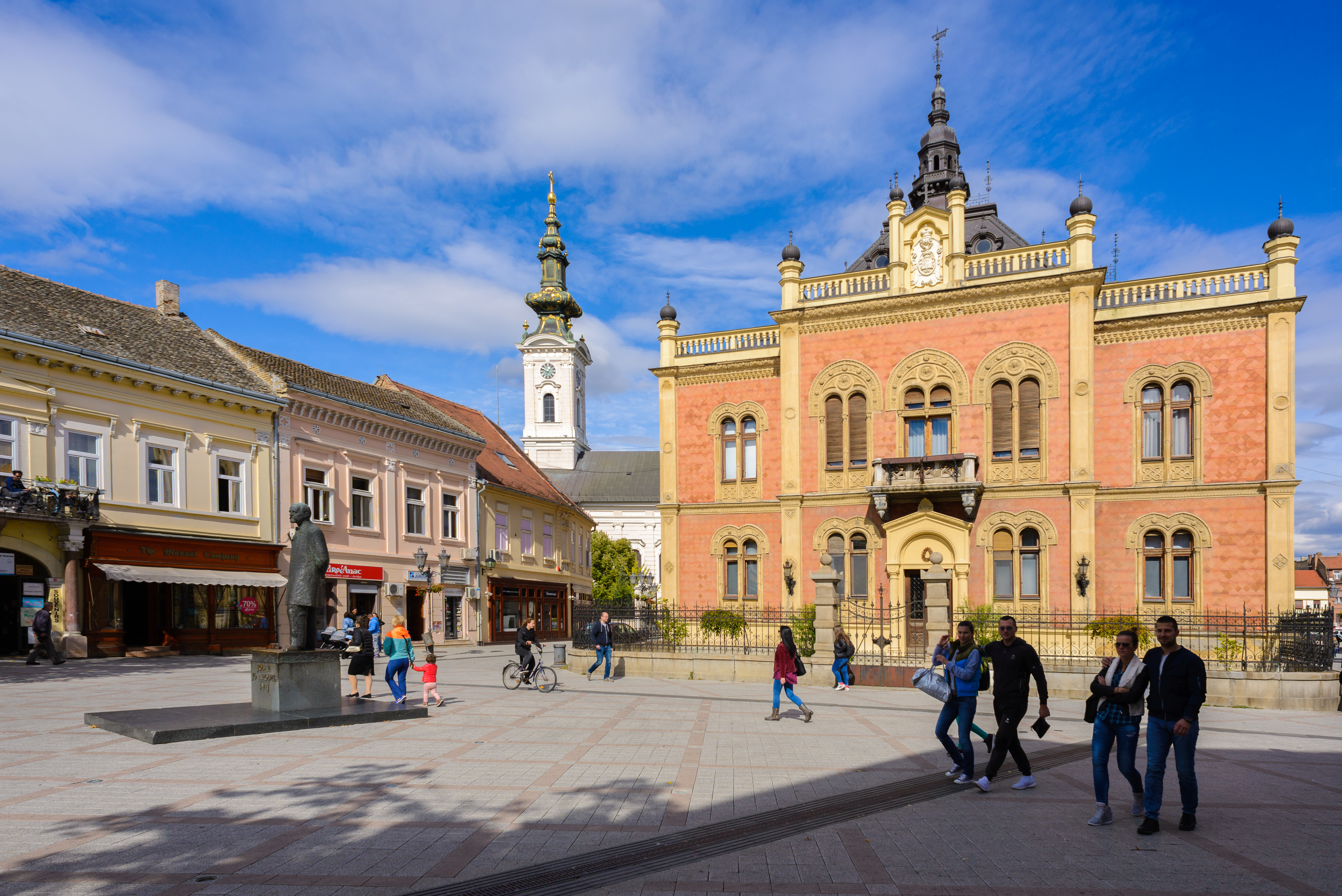 Novi Sad